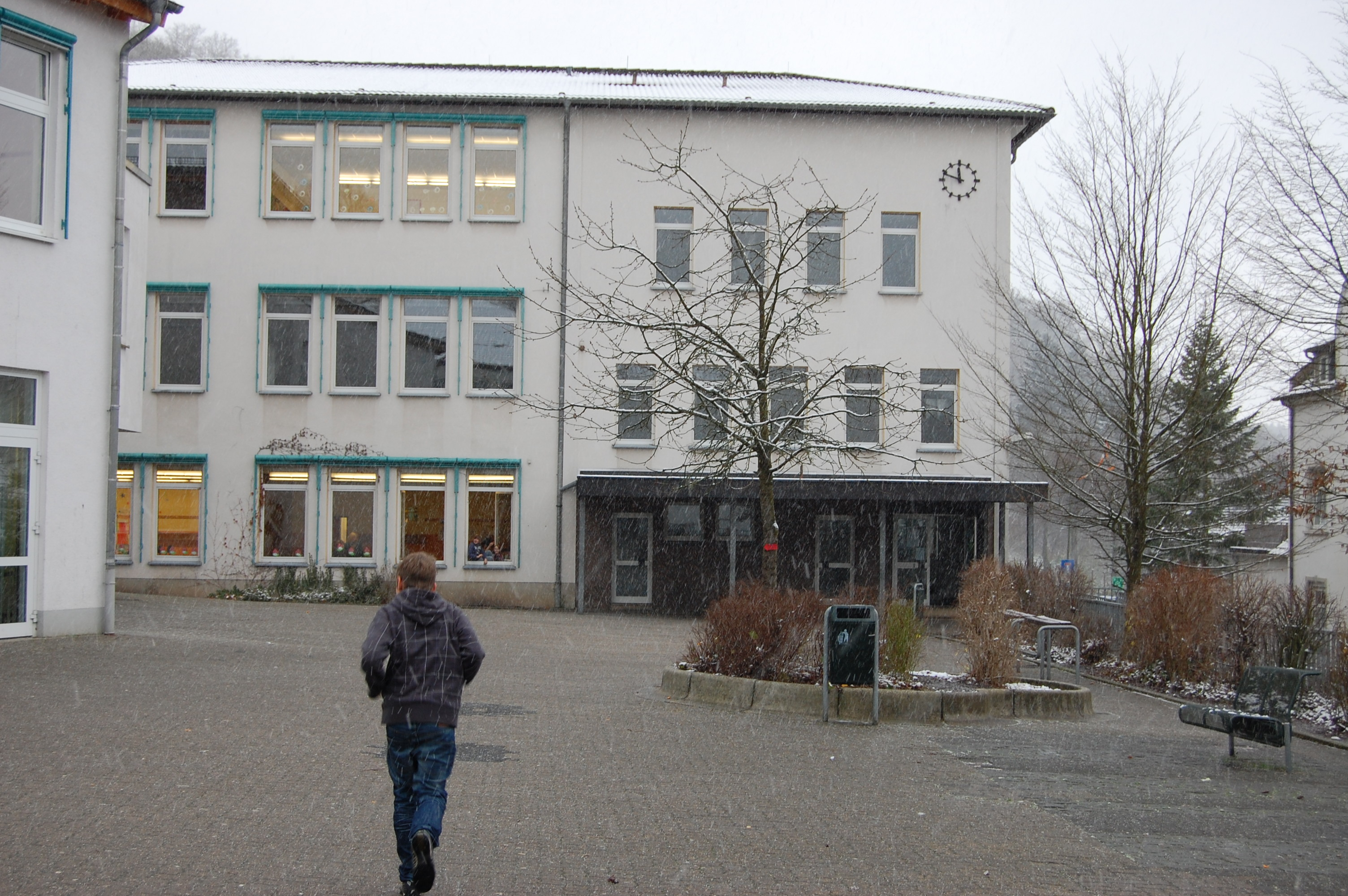 Haupteingang der Realschule Schalksmühle in Westfalen